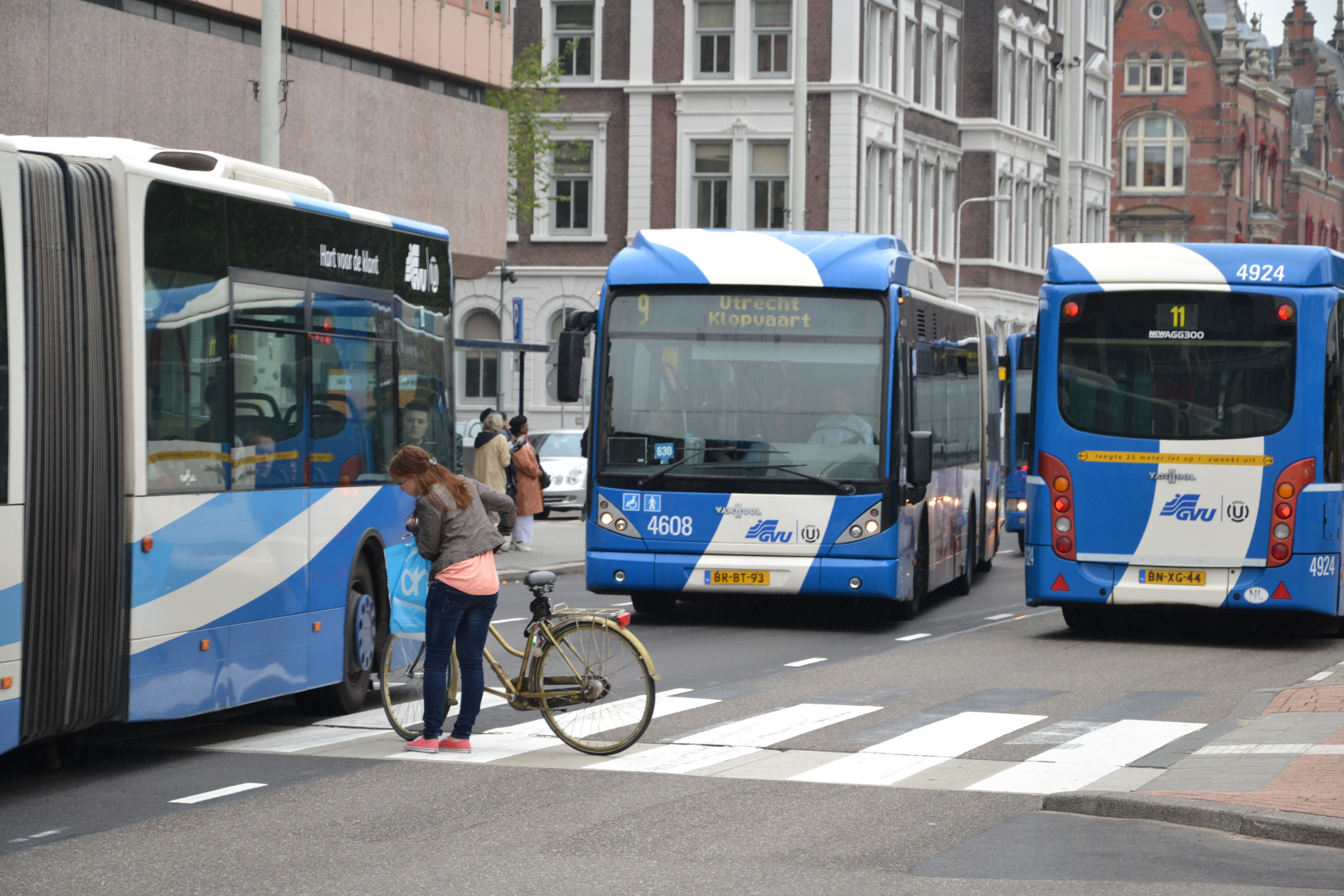 Een impressie van de (volgends de gemeente Utrecht) chaos rond het Utrechtse Centraal station